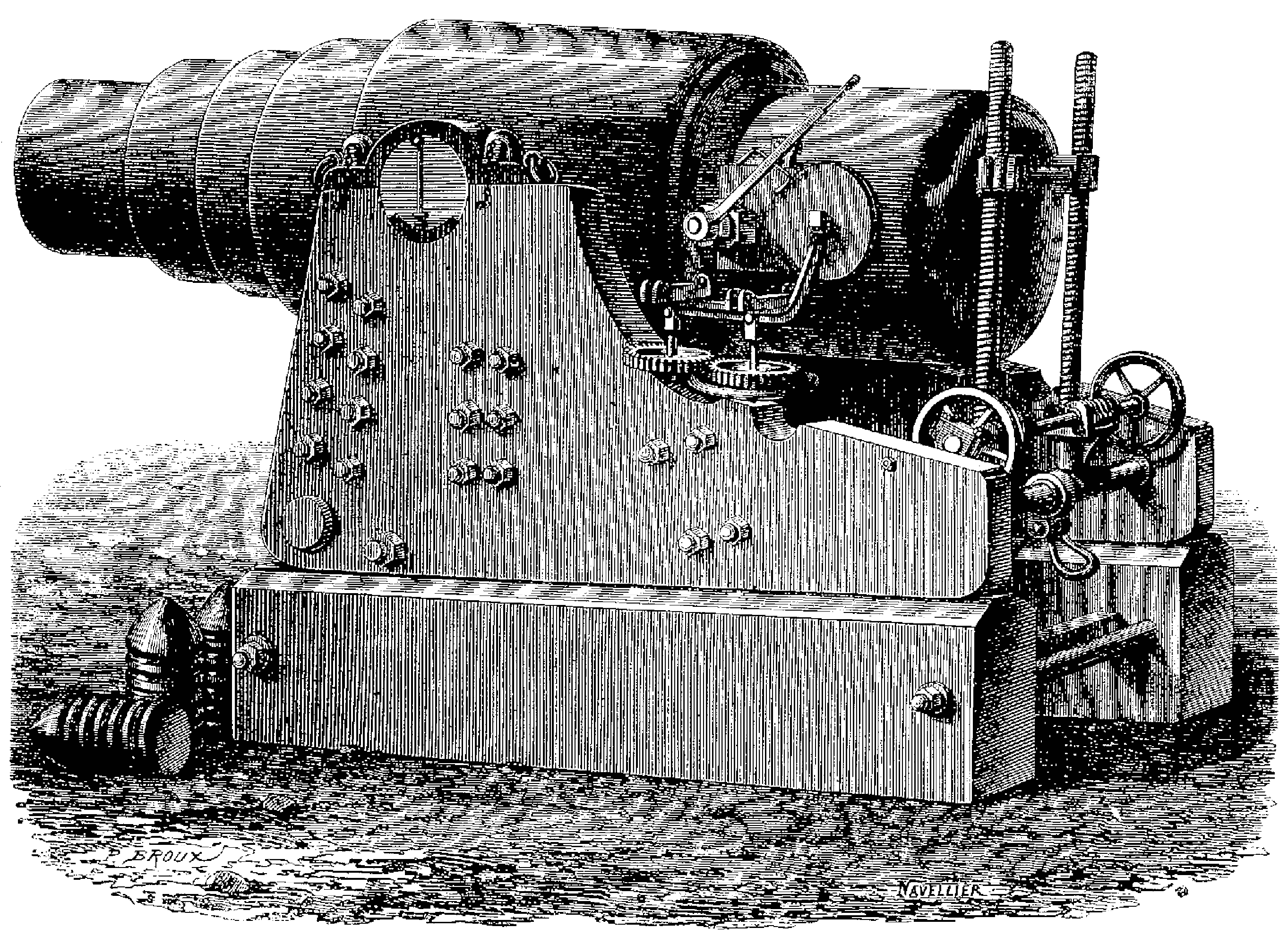 Le canon monstre de l’Exposition universelle de 1867